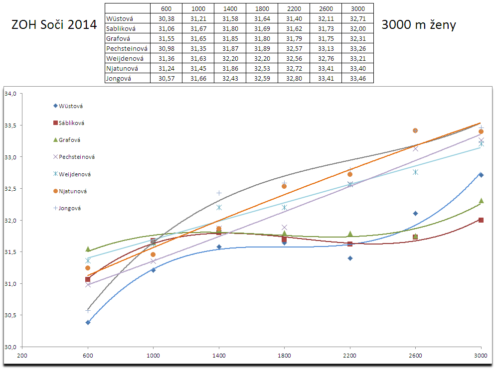 3km women sochi 2014